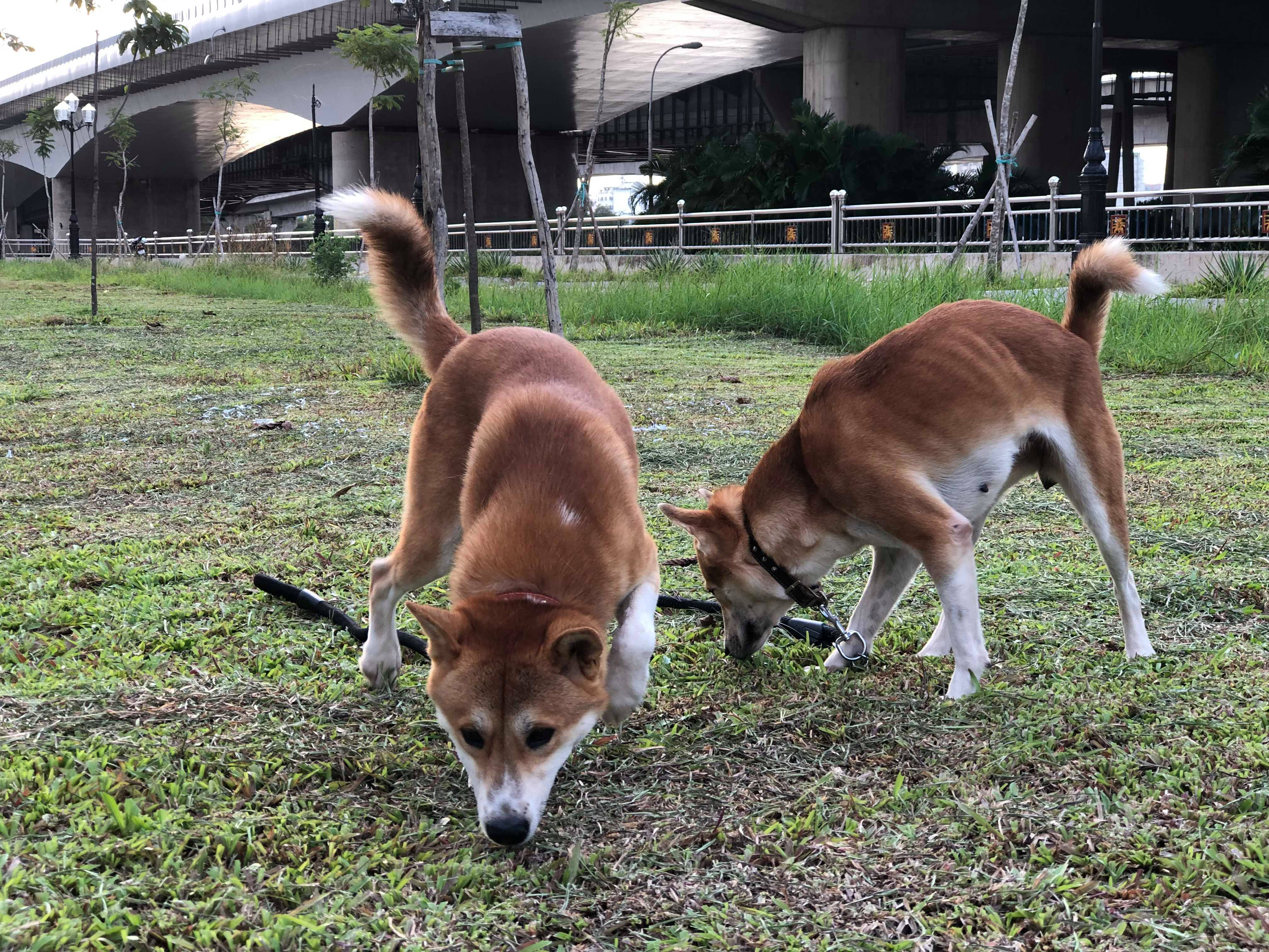 Phở và Hủ Tiếu